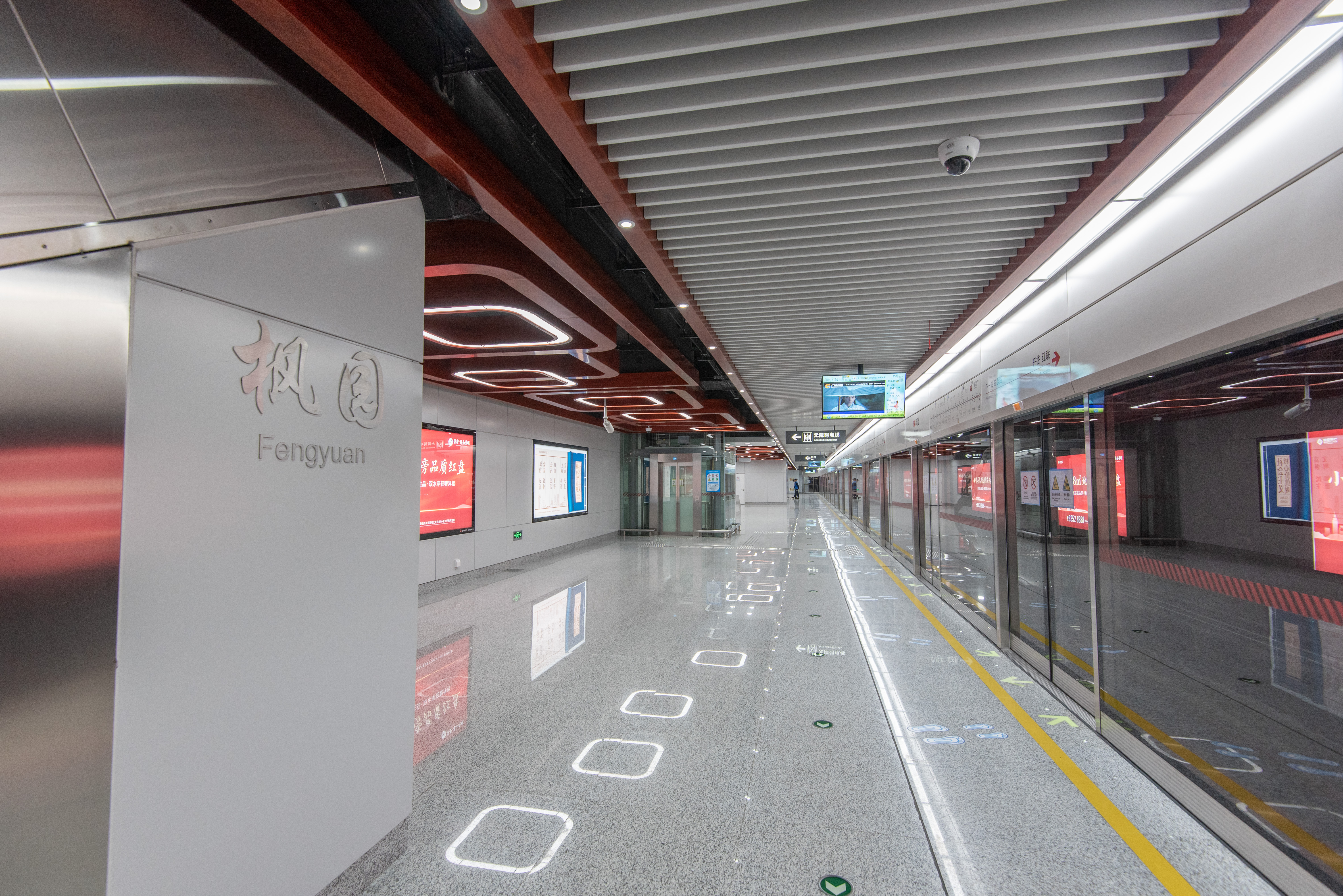 宁波轨道交通枫园站